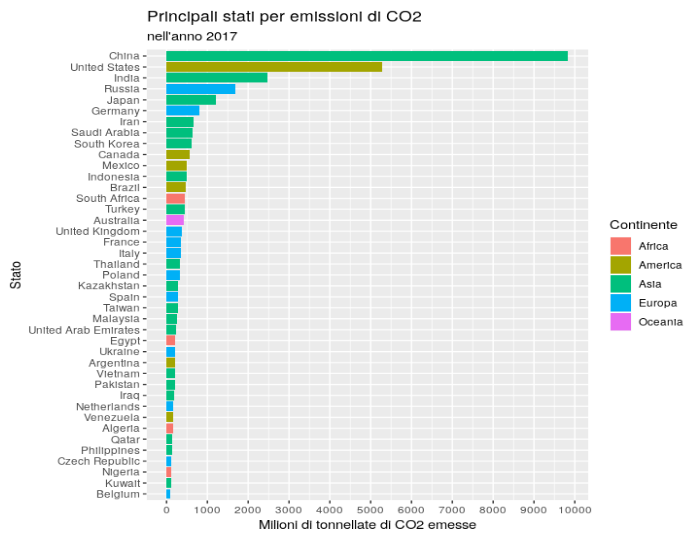 File realizzato con RStudio con dati presi da qui